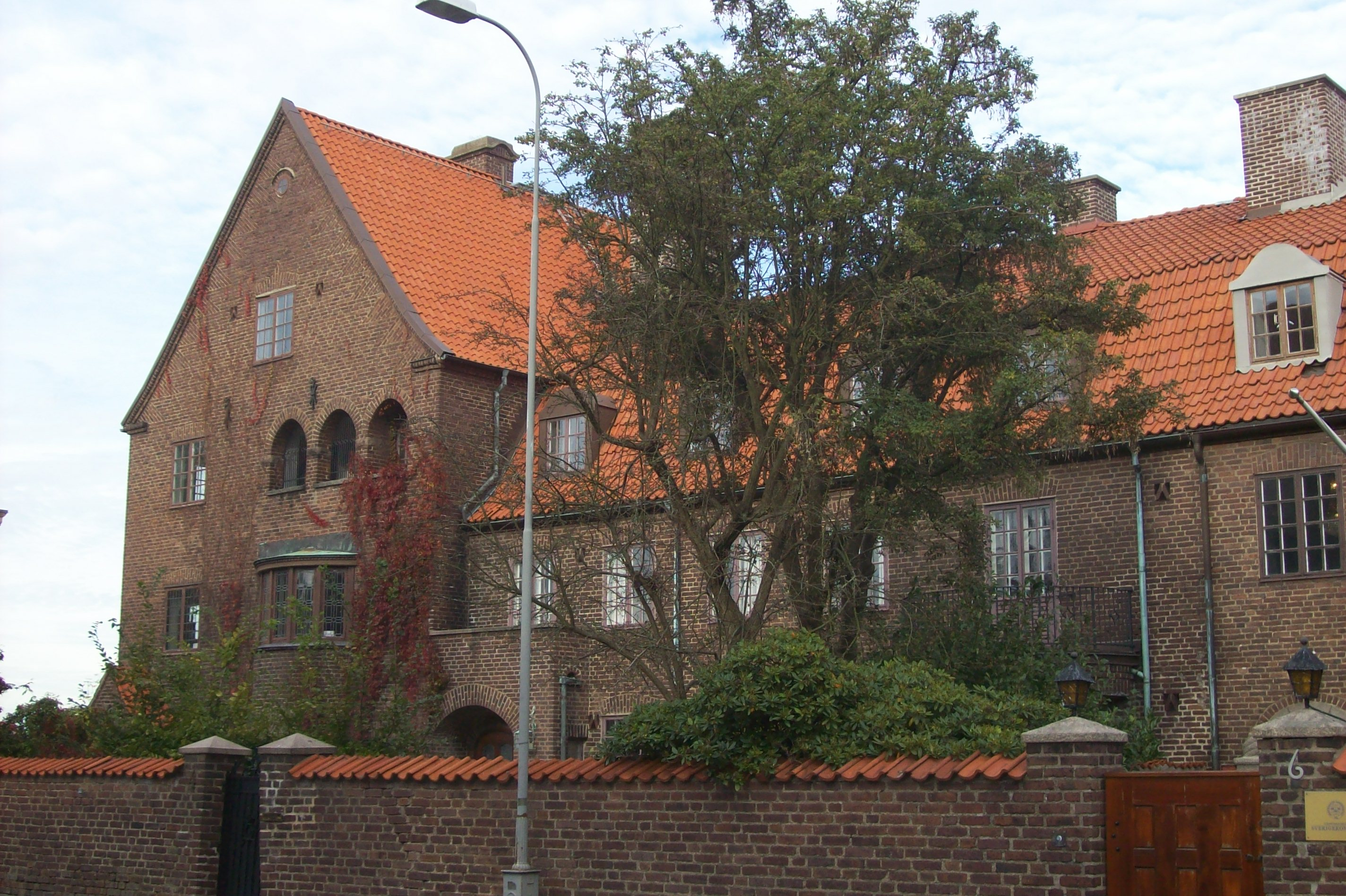 Göteborg Lorensberg 13:1 (vänster) & 13:2 (höger), Lorensbergs Villastad. Två av sex hus i ett radhus. Dicksonsgatan 2 & 4, Göteborg.